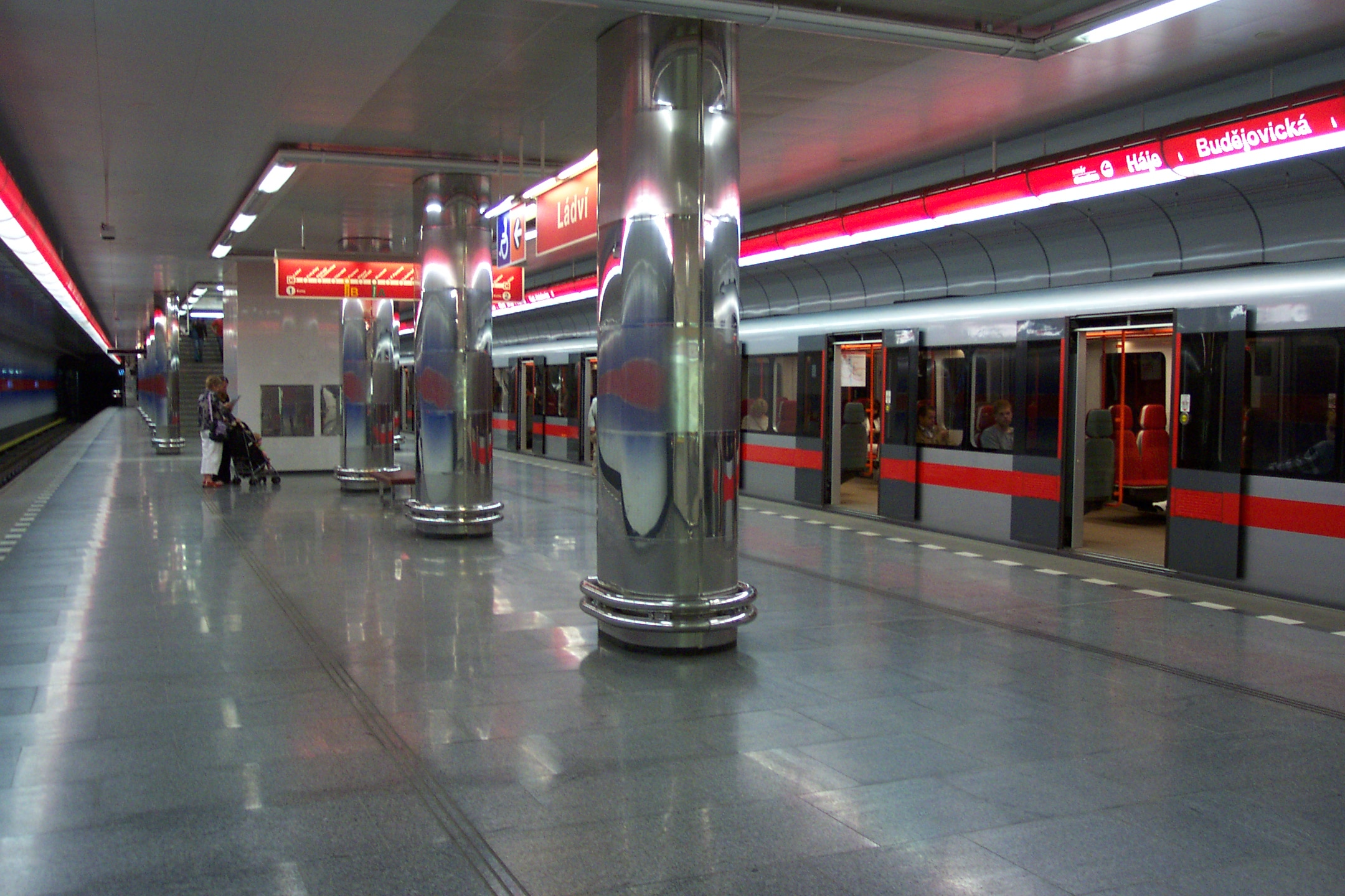 Metro station Ládví in Prague, opened 2004 - Stanice metra Ládví v Praze, otevřena v roce 2004